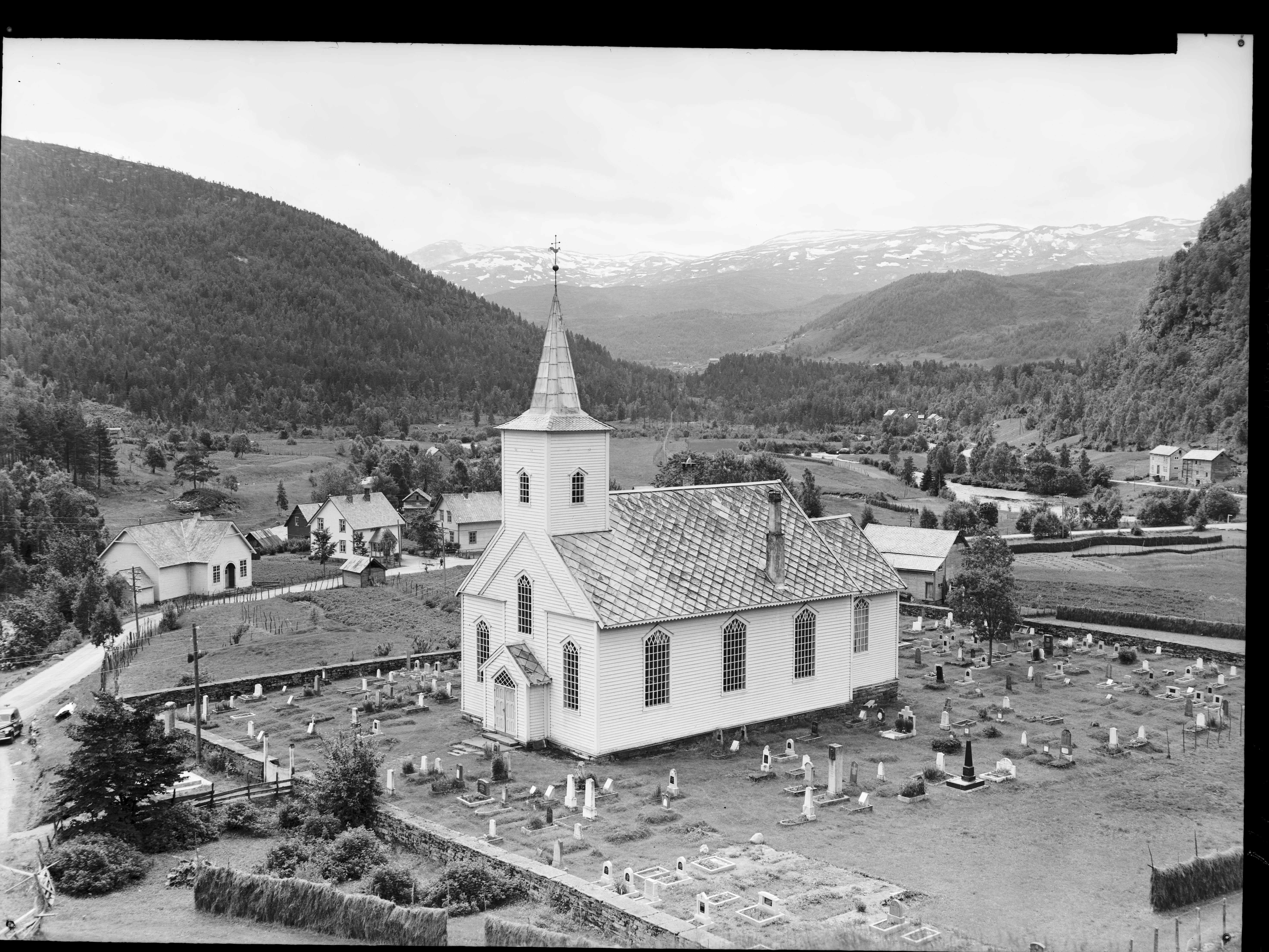 Bildet er hentet fra Nasjonalbibliotekets bildesamling. Anmerkninger til bildet var: fotograf ukjent Vinje, Voss, Hordaland